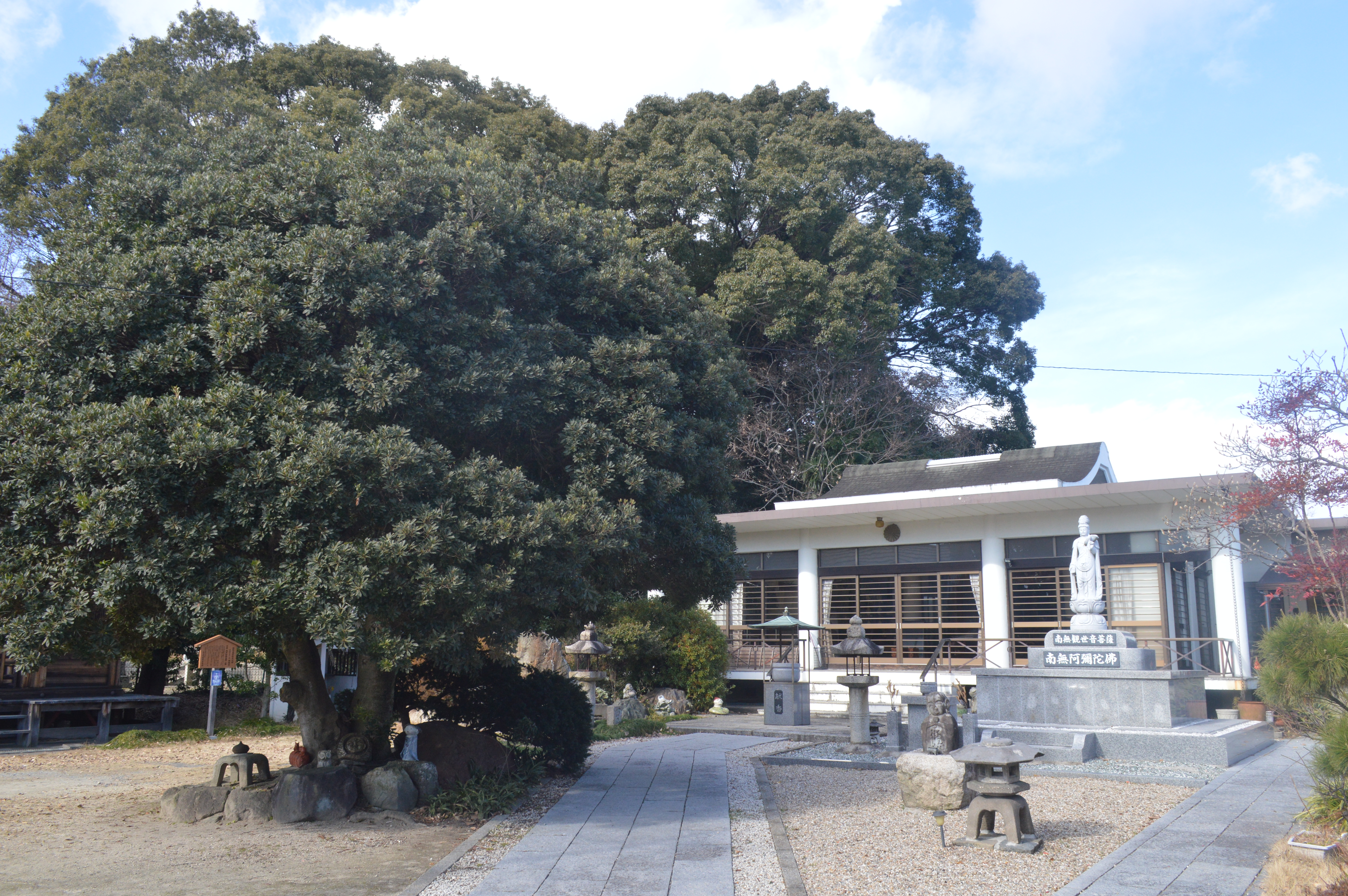 愛知県海部郡大治町の明眼院。